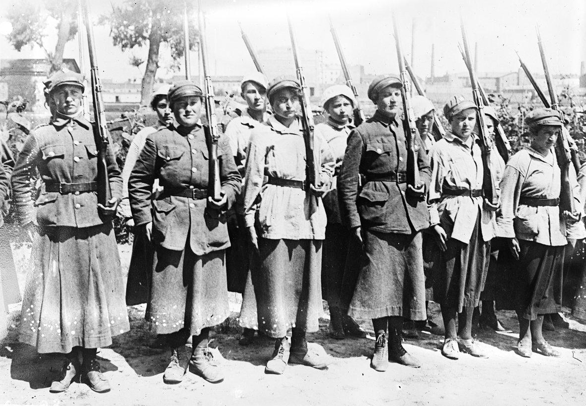 Femmes d'un bataillon polonais. Guerre russo-polonaise, août 1920.